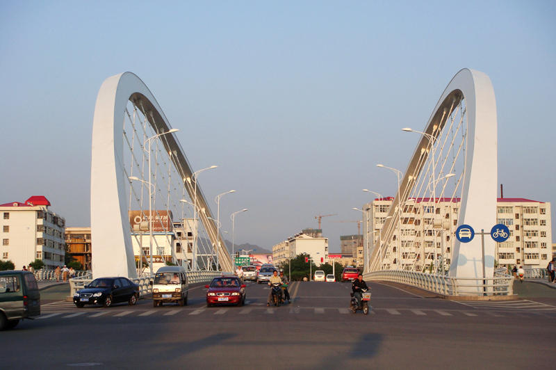 张家口市清水河上的双虹桥，拍摄于2010年6月10日。